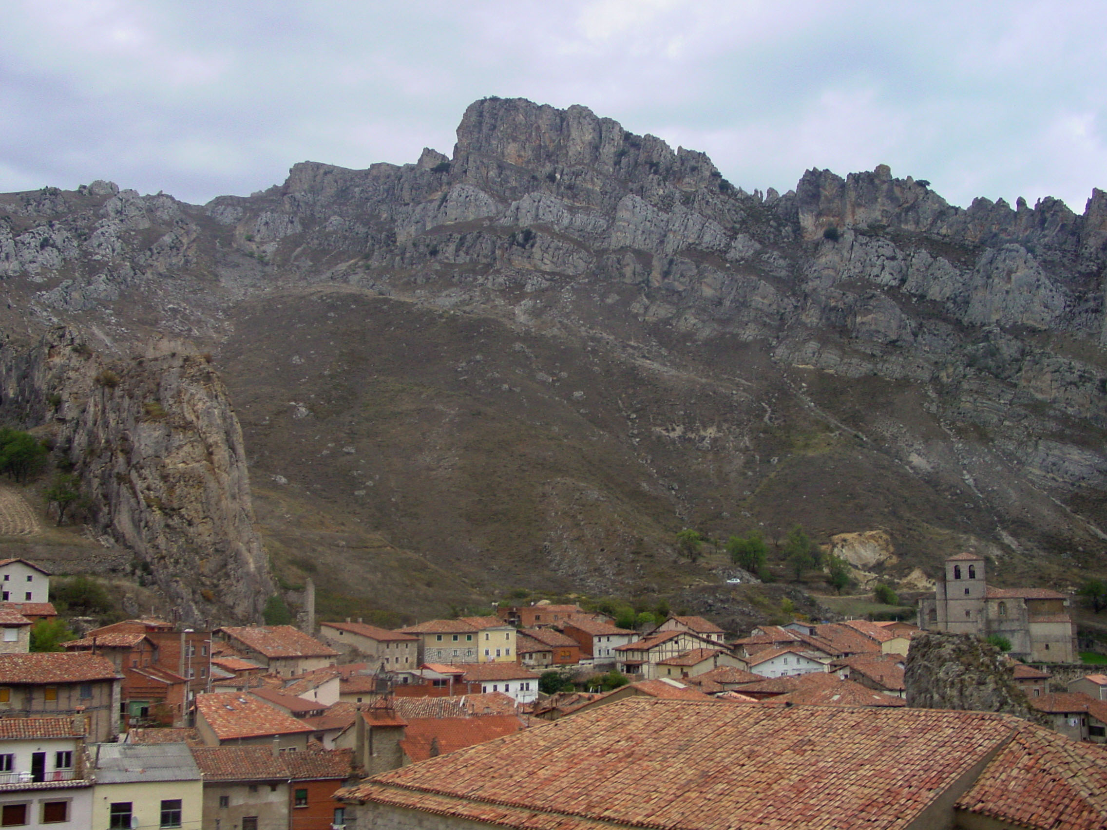 Vista de Pancorbo